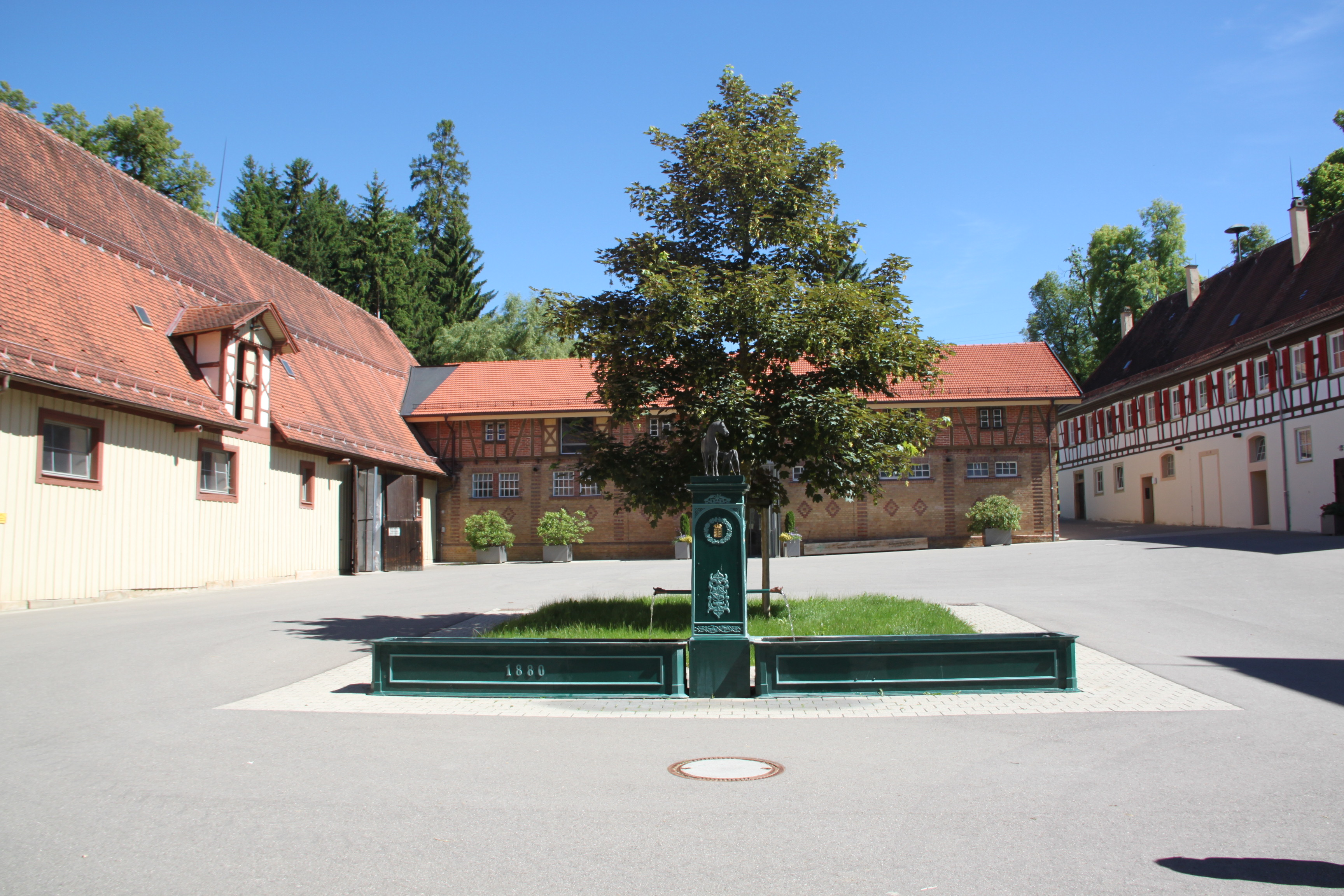 Foto: Pfefferle